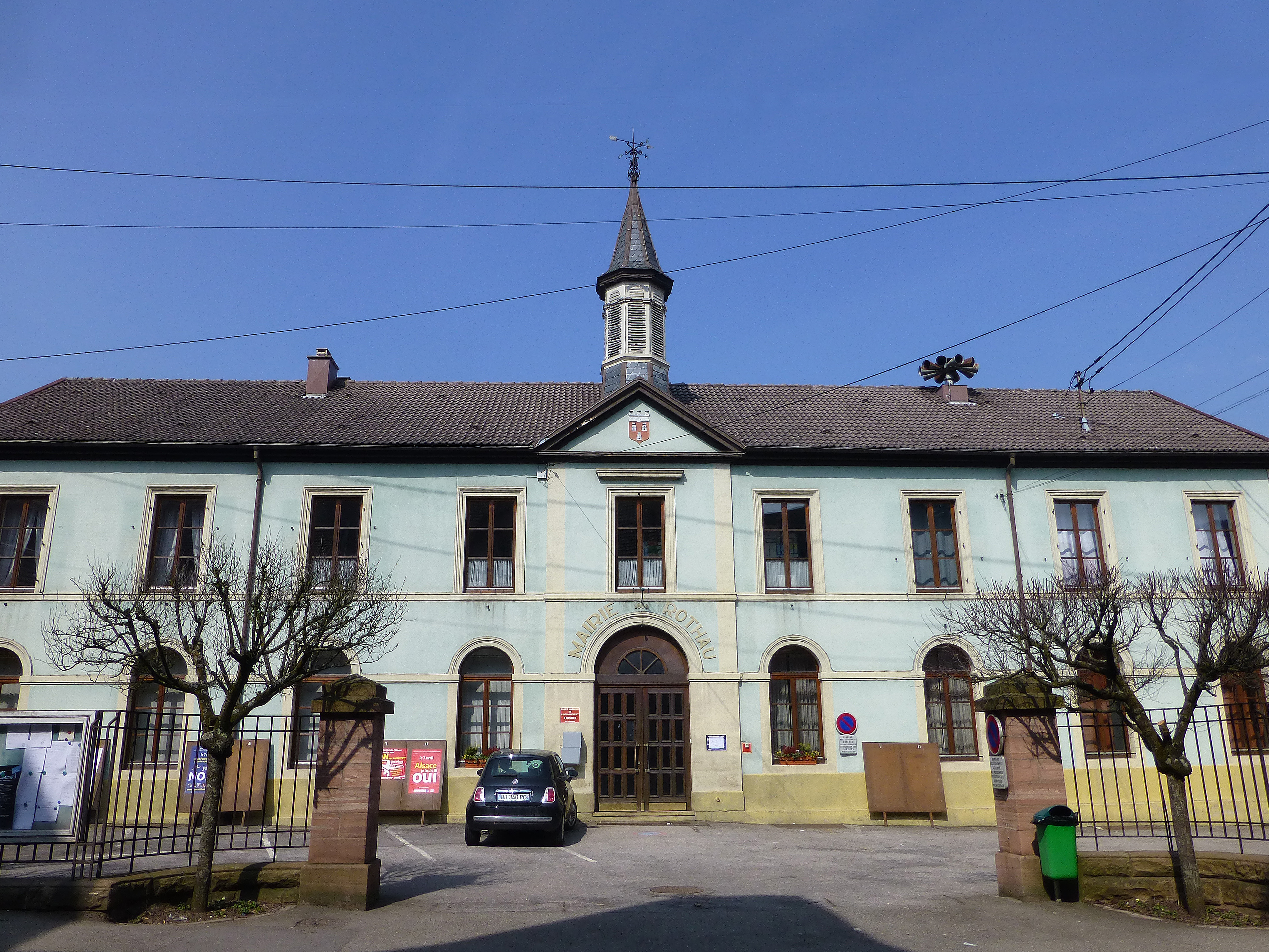 Rothau (Bas-Rhin) : Hôtel de ville